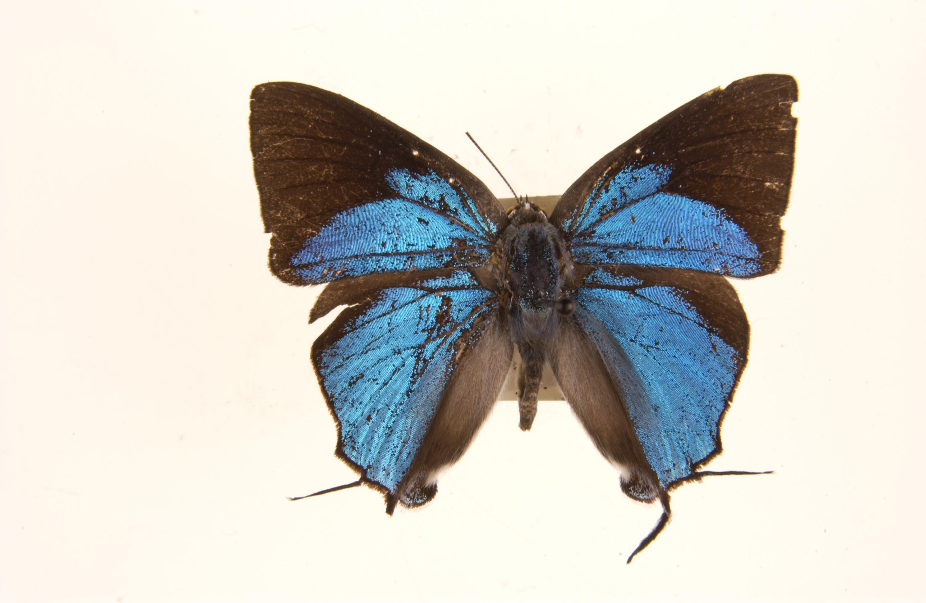 Tajuria cippus Male